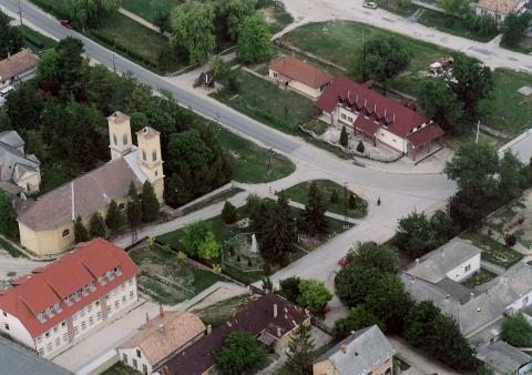 Polgárdi, Hungary, aerialphotography, Szent István király római katolikus templom